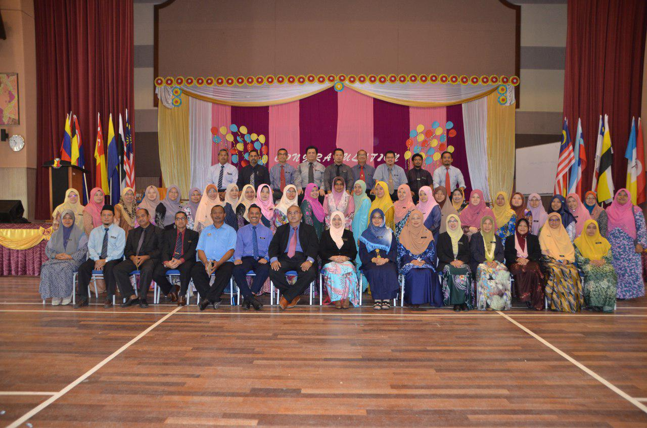 TUSZA BOLEH